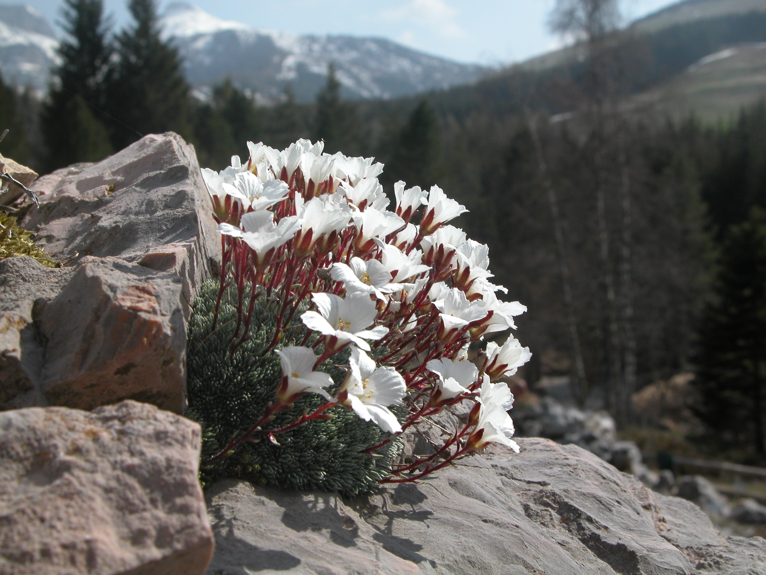 sassifraga